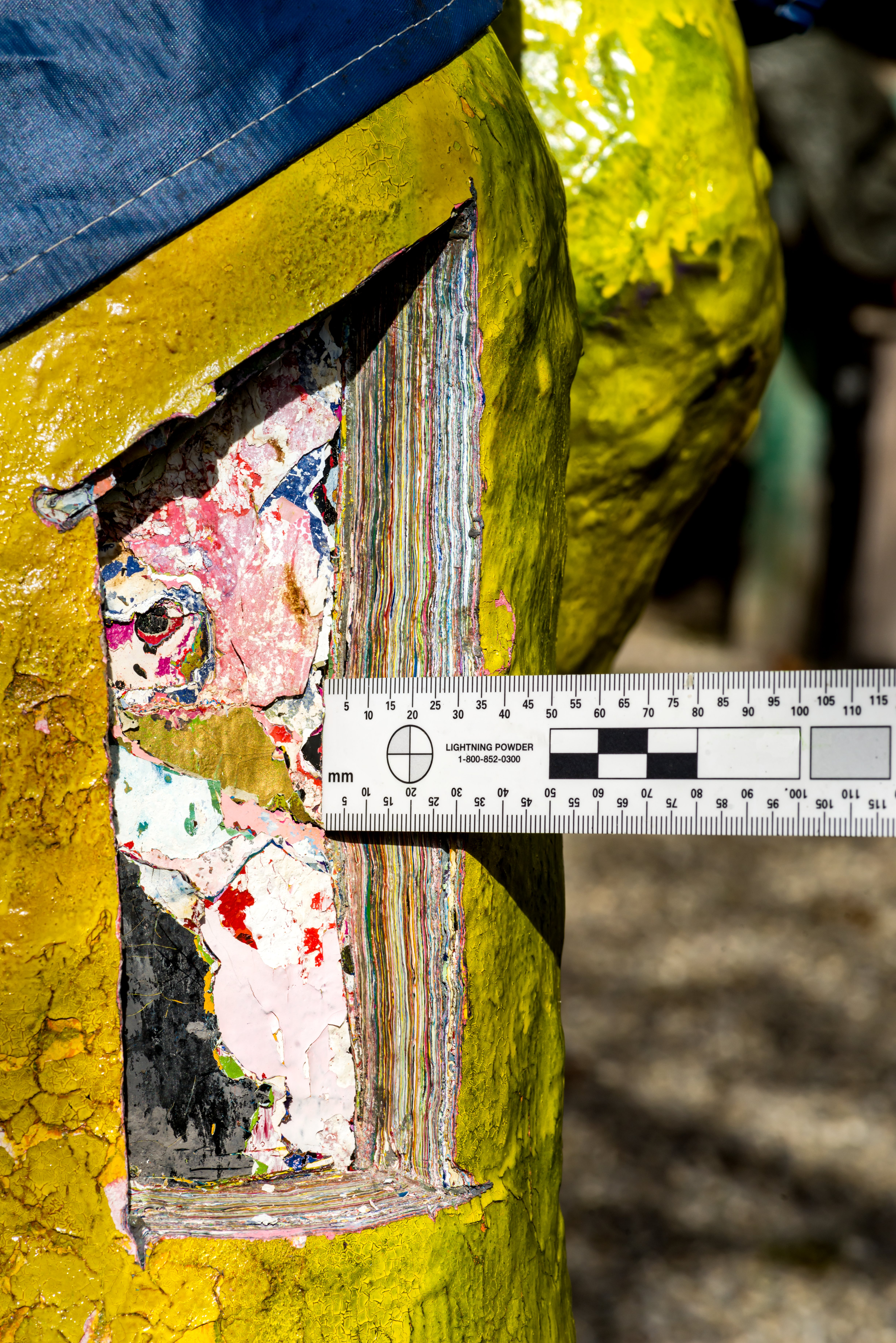 Blick auf die Farbschichten, bei Probeschnitten am Restaurationsobjekt entstanden. Es wird untersucht auf welche Weise die Farbschichten schonend entfernt werden können. Hier wurde eine oszillierende Säge (Gipssäge) verwendet.